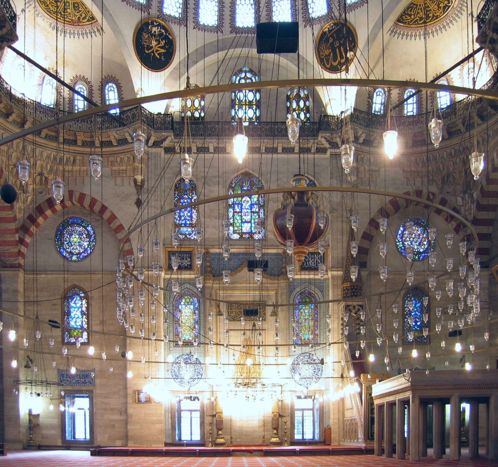 Süleymaniye Camii, Istanbul, Innenansicht.